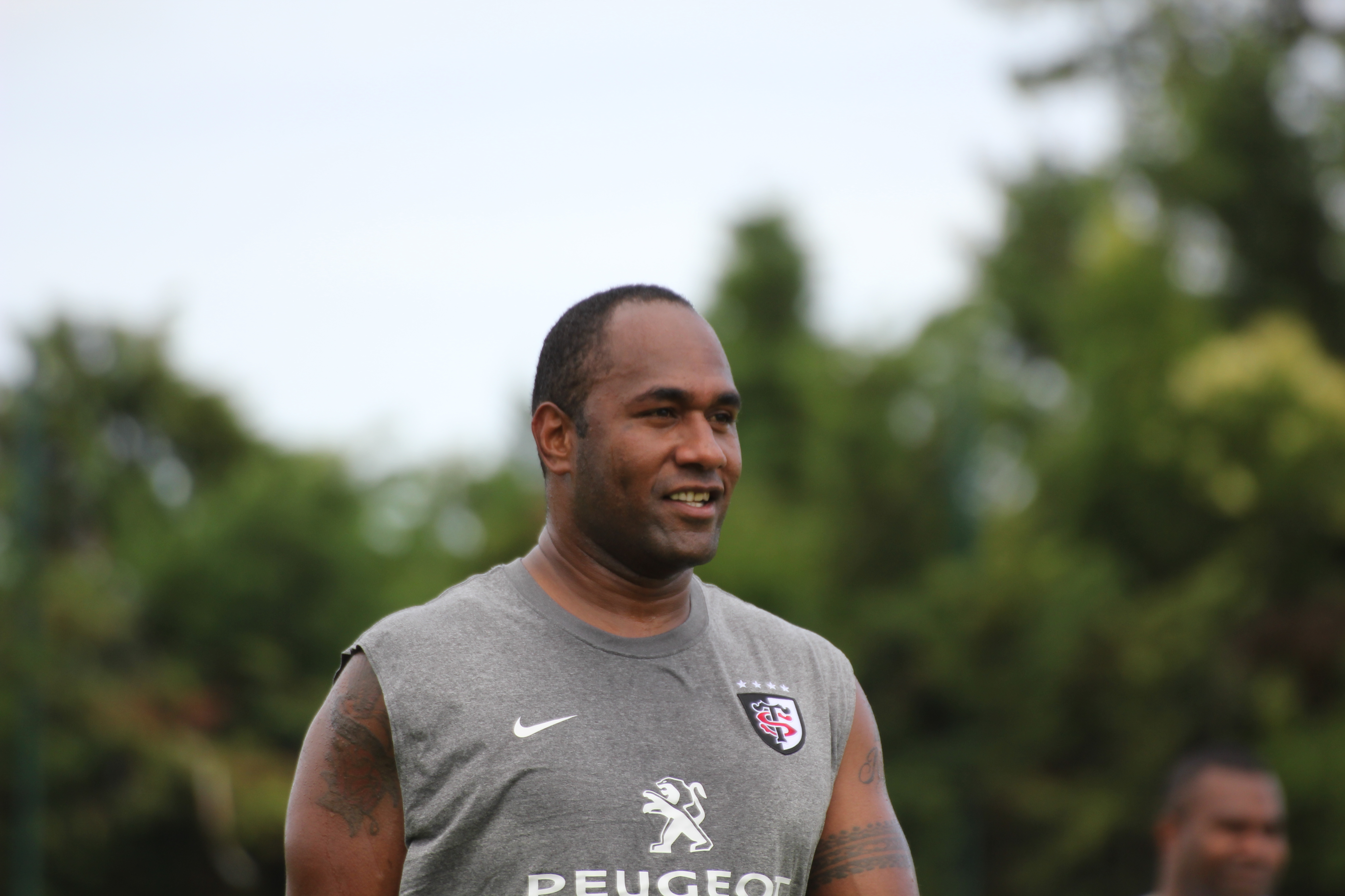 Vilimoni Delasau - Entrainement du stade toulousain du 18 juillet 2011